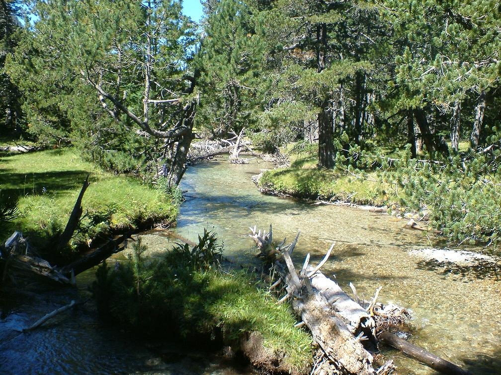 Planell d'Aigüestortes; la Vall de Boí, Alta Ribagorça, Catalunya